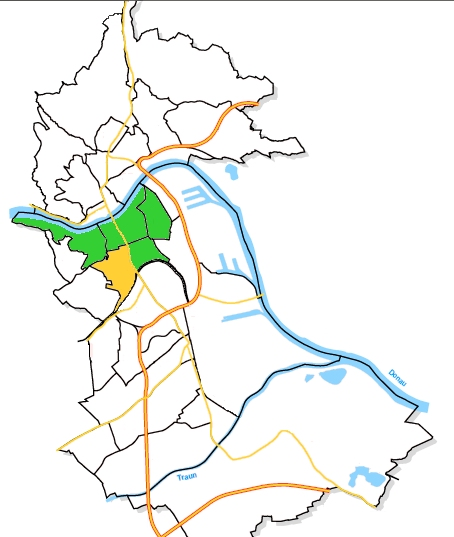 Städtische Bezirke Linz - Volksgartenviertel hervorgehoben. Selbst gezeichnet auf Grundlage von: "Stadtforschung Linz: Linz 2000. Fakten, Bilder, Grafiken." (der greg:) 26.8.2006 - Lizenz: CC-BY-SA 2.0